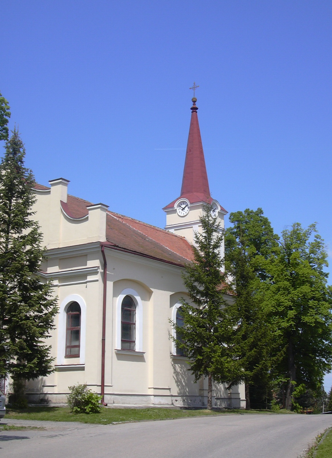 Kostel svatého Ferdinanda, Chvalkovice na Hané (a part of Ivanovice na Hané, Vyškov District, Czech Republic)